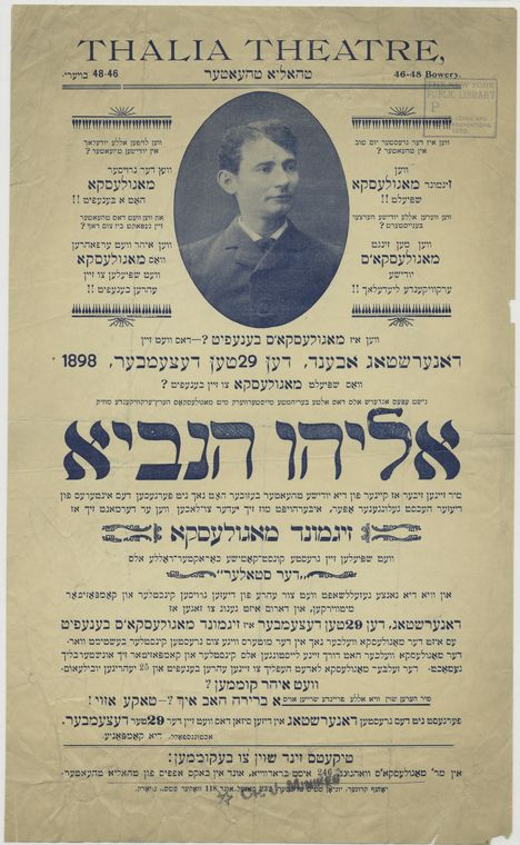 Афиша спектакля с участием З. Могулеско